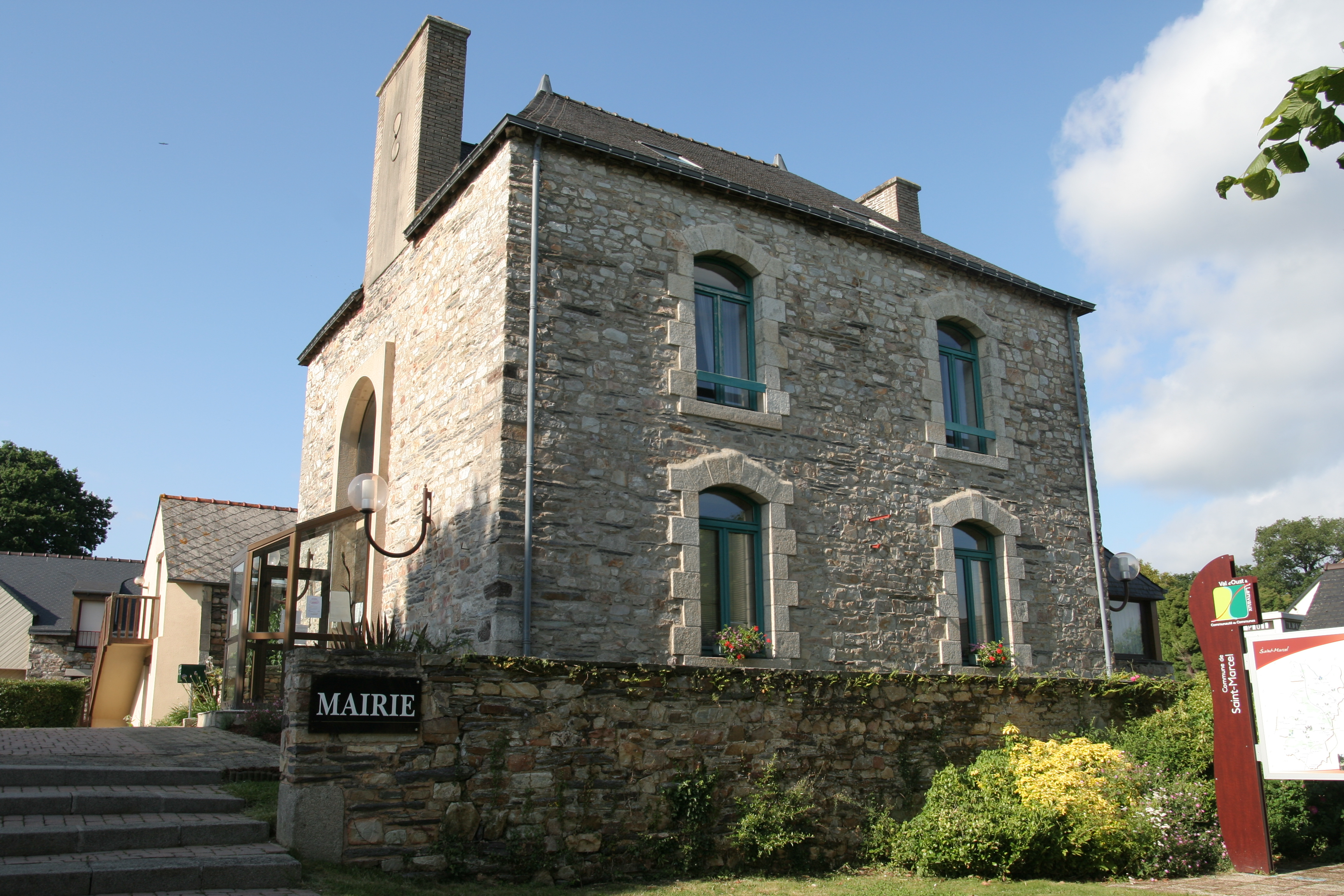 Mairie Saint-Marcel.